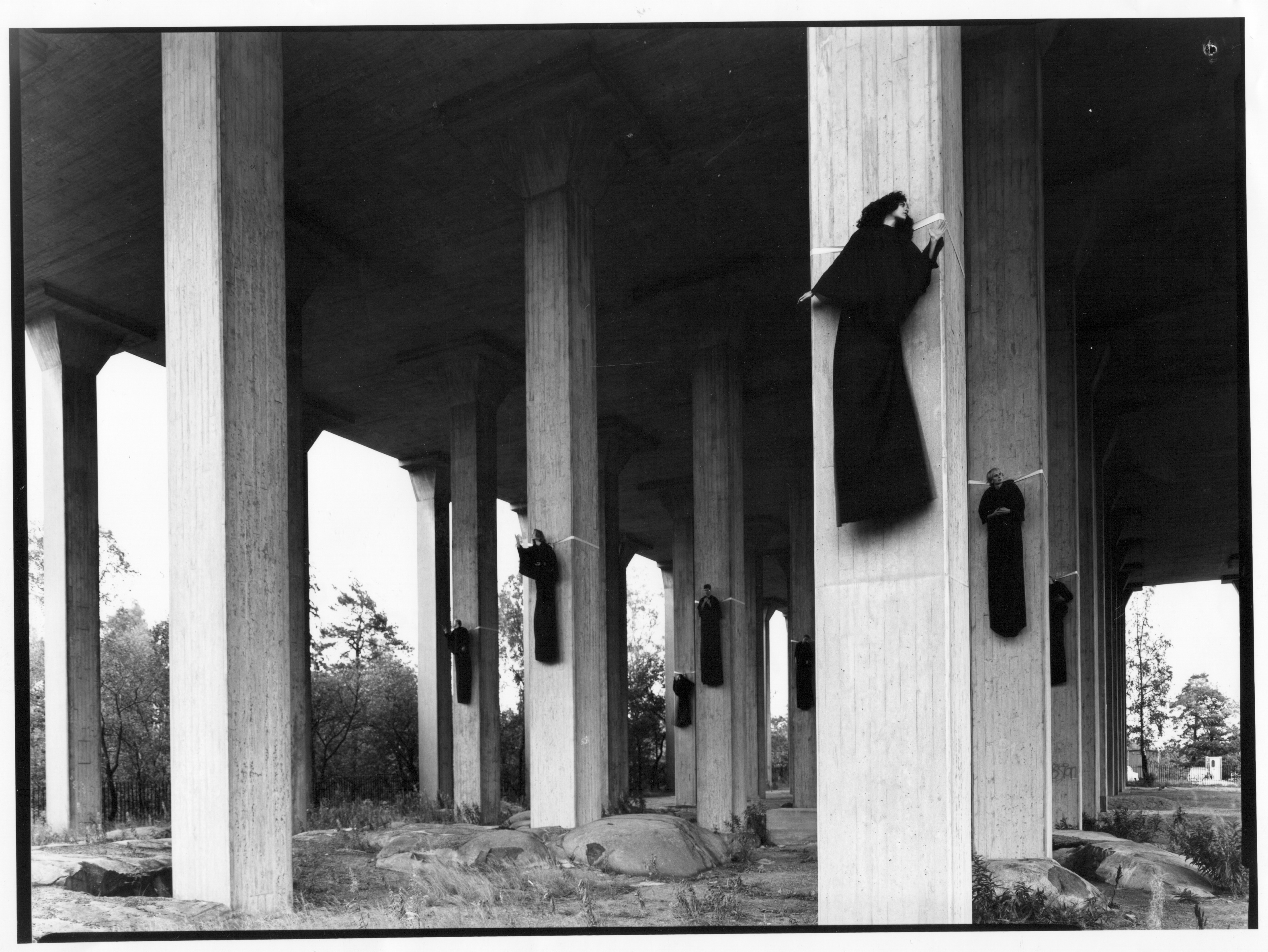 Beautiful Sadness, Uggleviksreservoaren, Lilljansskogen, Stockholm 1992